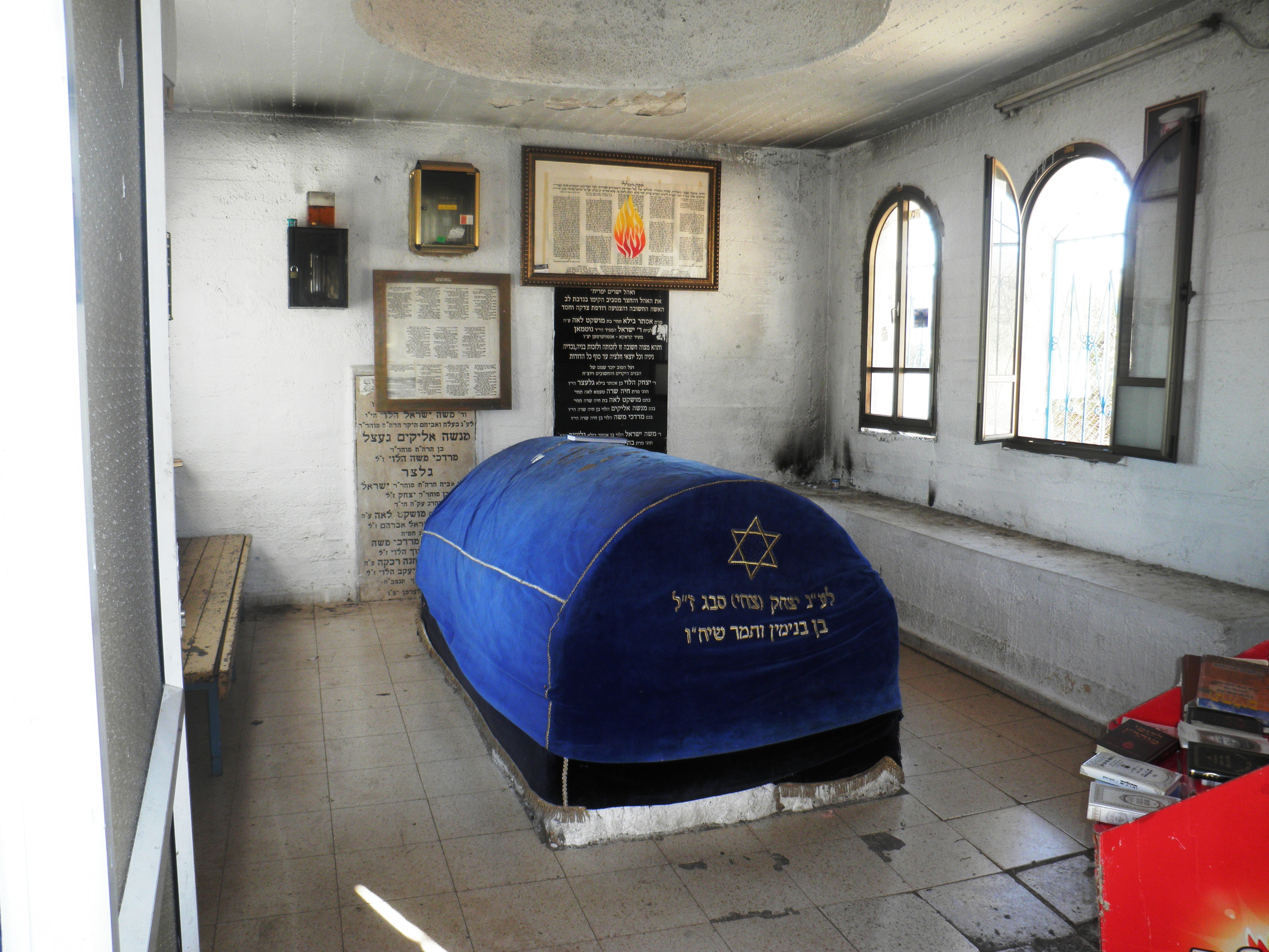 קבר חבקוק הנביא